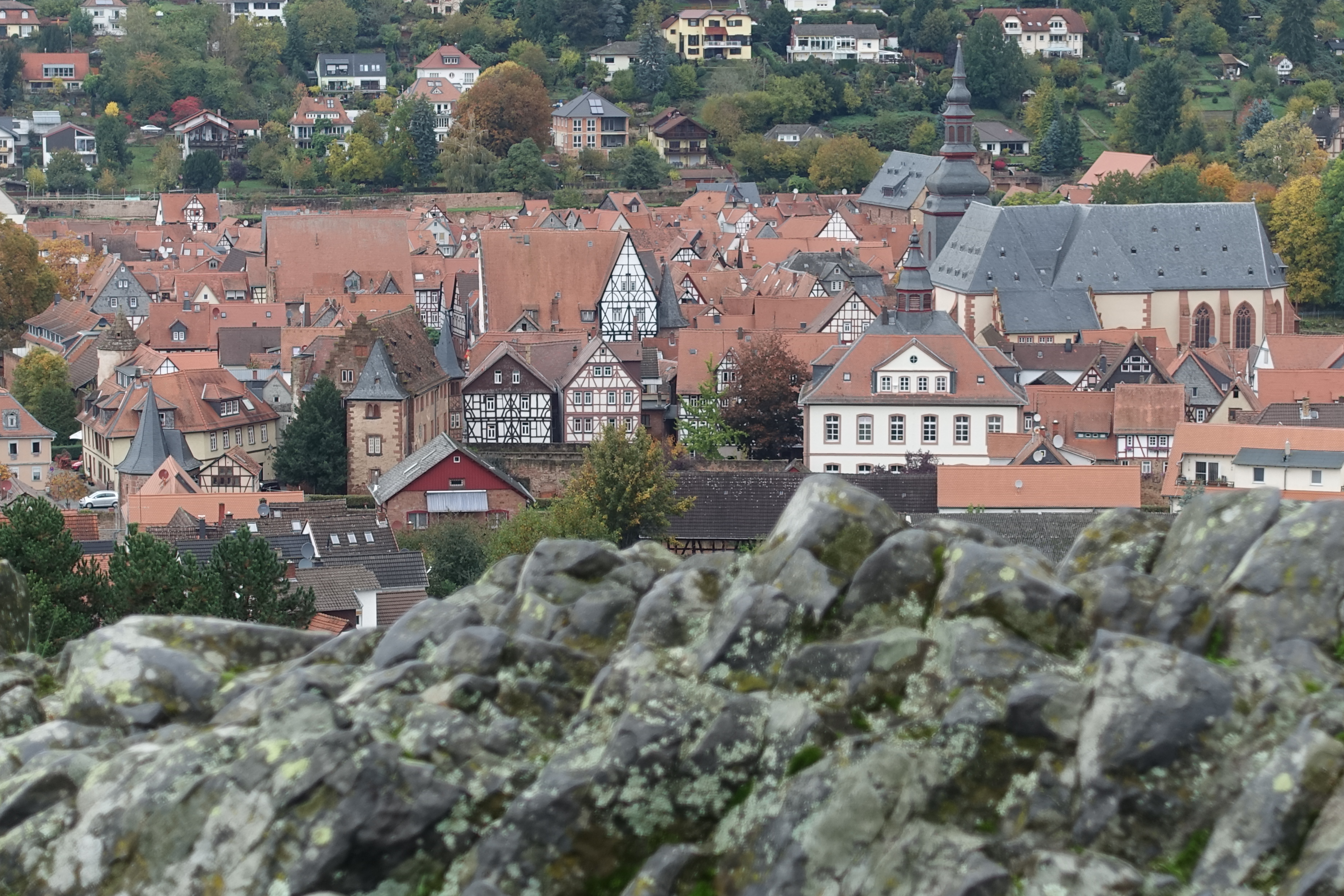 Blick nach Westen auf Büdingen vom Geotop „Wilder Stein“ am Ostrand der Altstadt